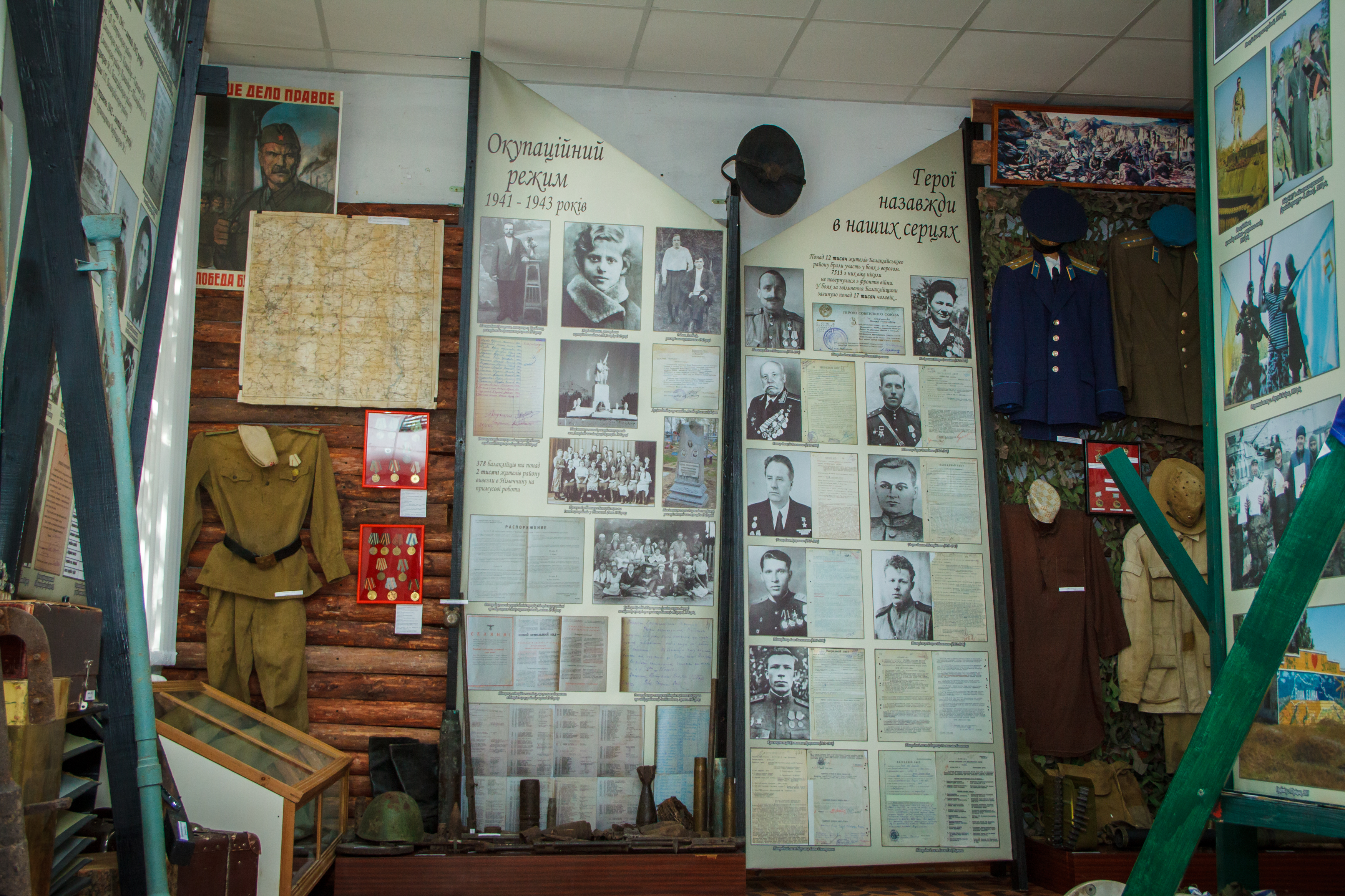 Експозиція «Стала слава козацькая славою Вкраїни» Балаклійського краєзнавчого музею